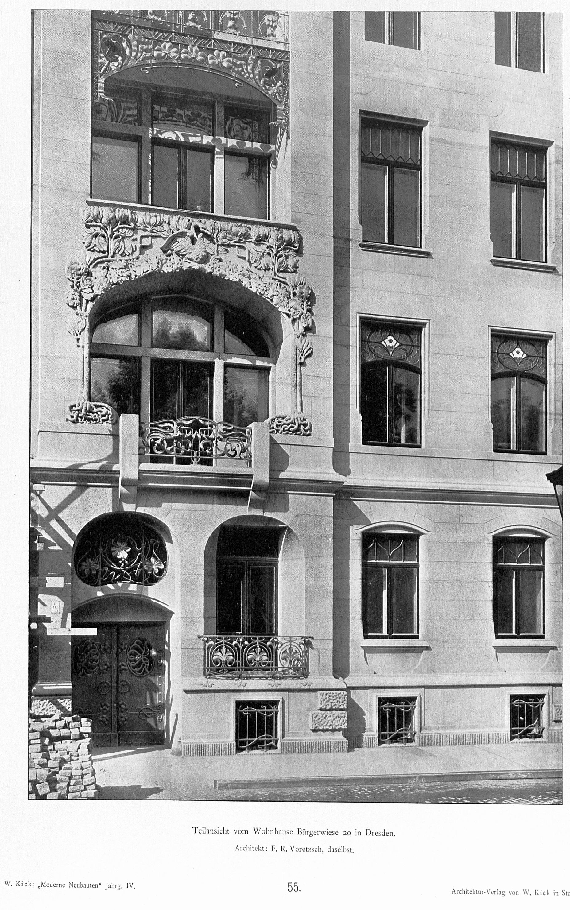 Mehrfamilienwohnhaus Bürgerwiese 20 in Dresden, Detail